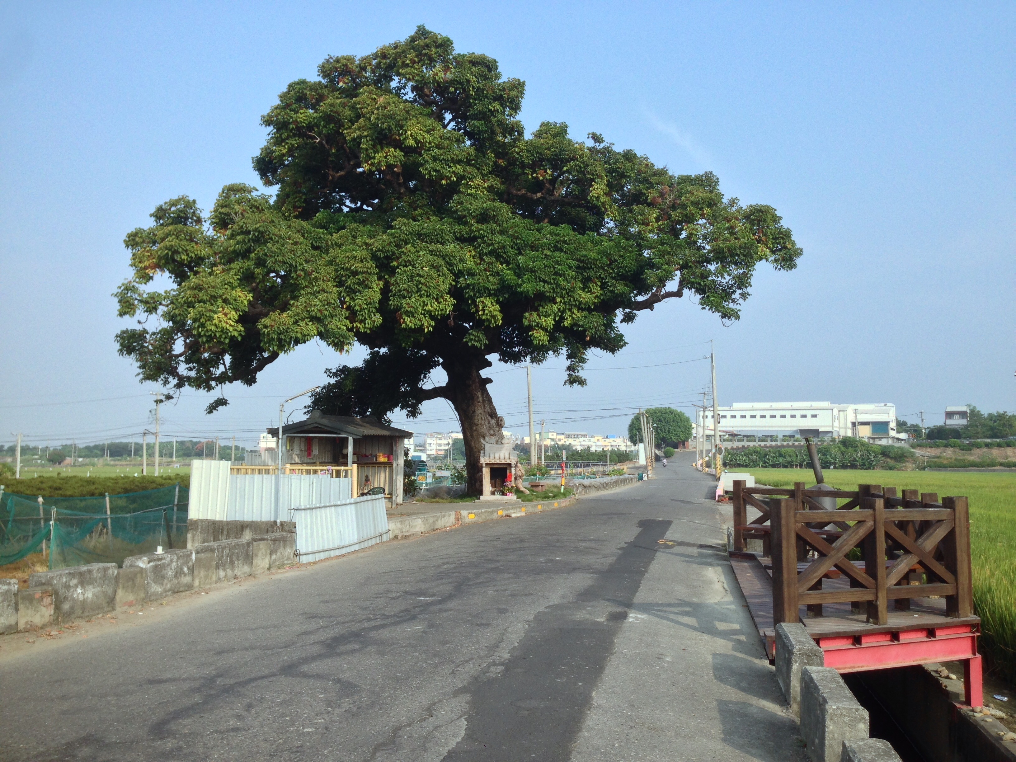 三春老樹一景